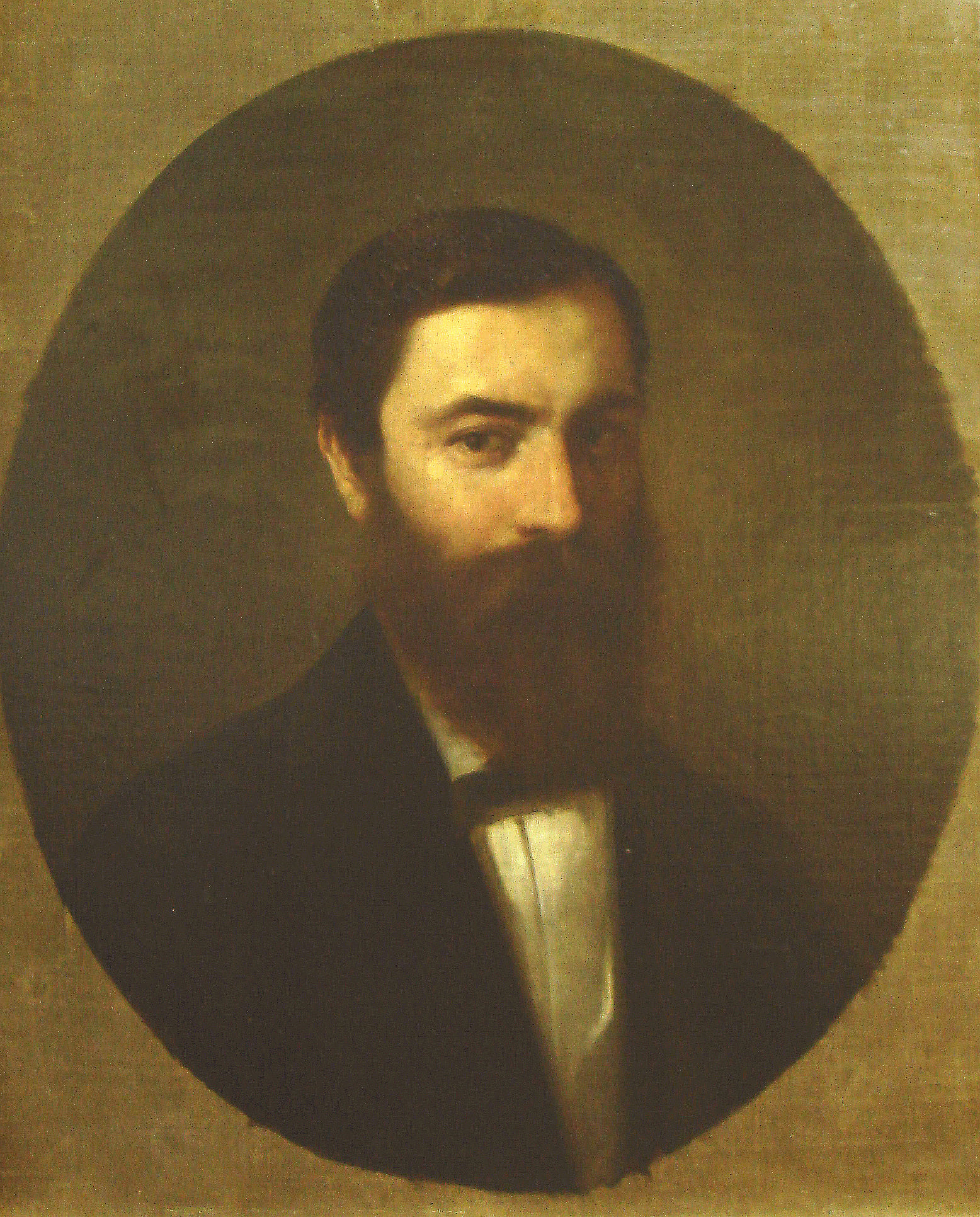 Gheorghe Tattarescu - Dumitru Tattarescu - Portret de bărbat (fratele artistului), văzut din faţă, având capul din semiprofil dreapte, părul scurt, poartă barba roşcată, Muzeul Memorial "Gh. M. Tattarescu" Bucureşti, 65x51,5 cm.